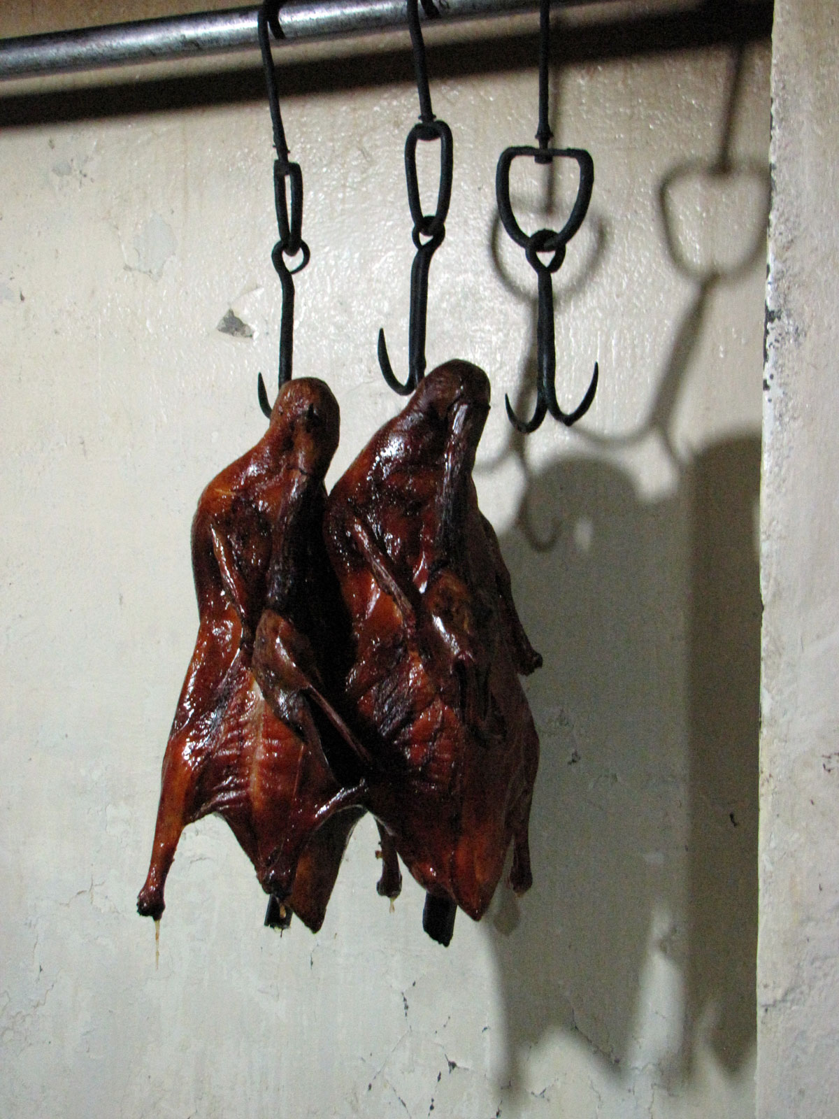 Roast Peking Duck